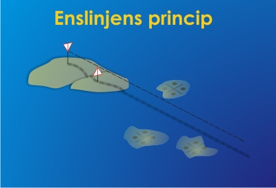 leading line